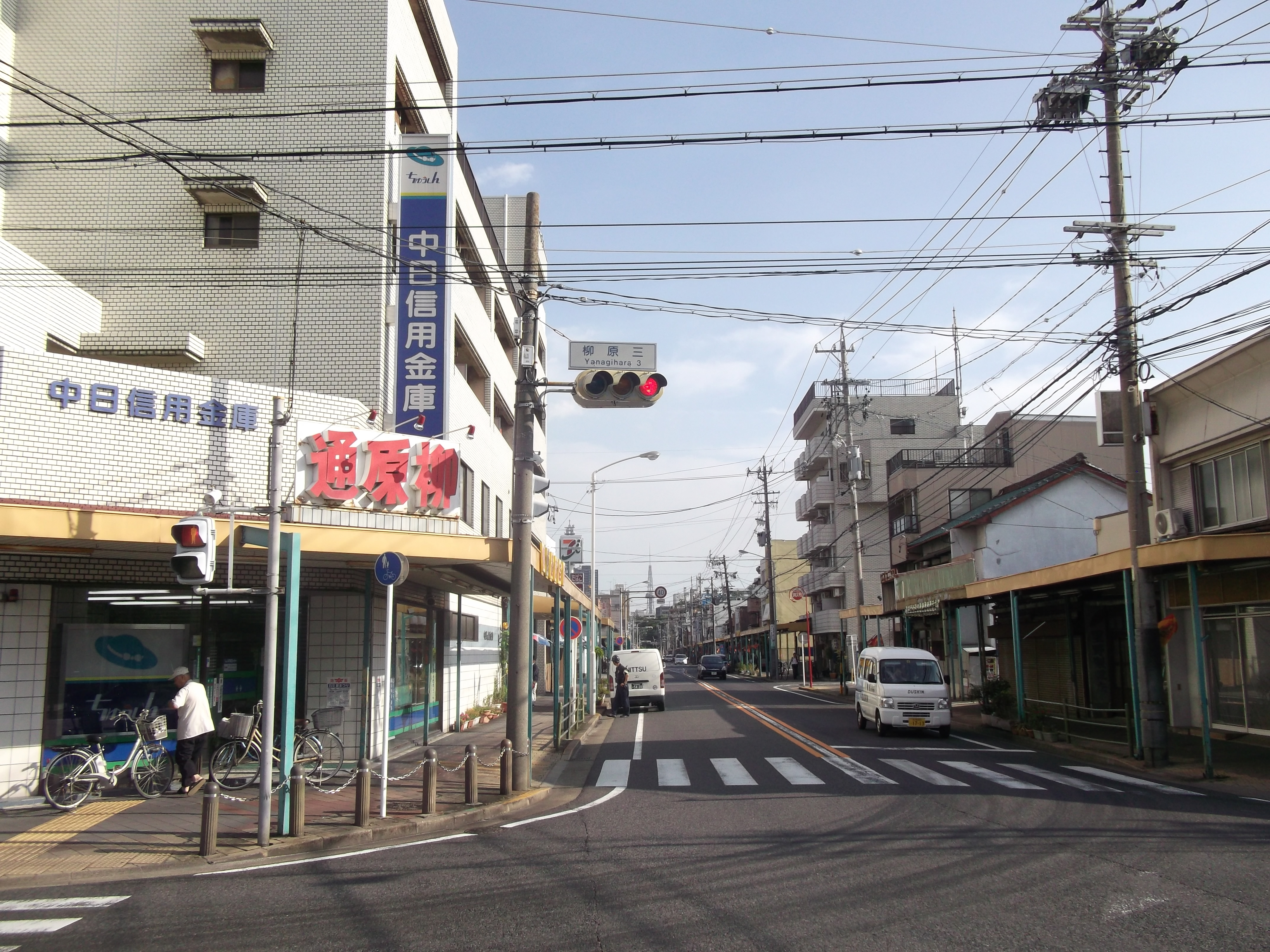 名古屋市北区の柳原通商店街を南側に向けて撮影